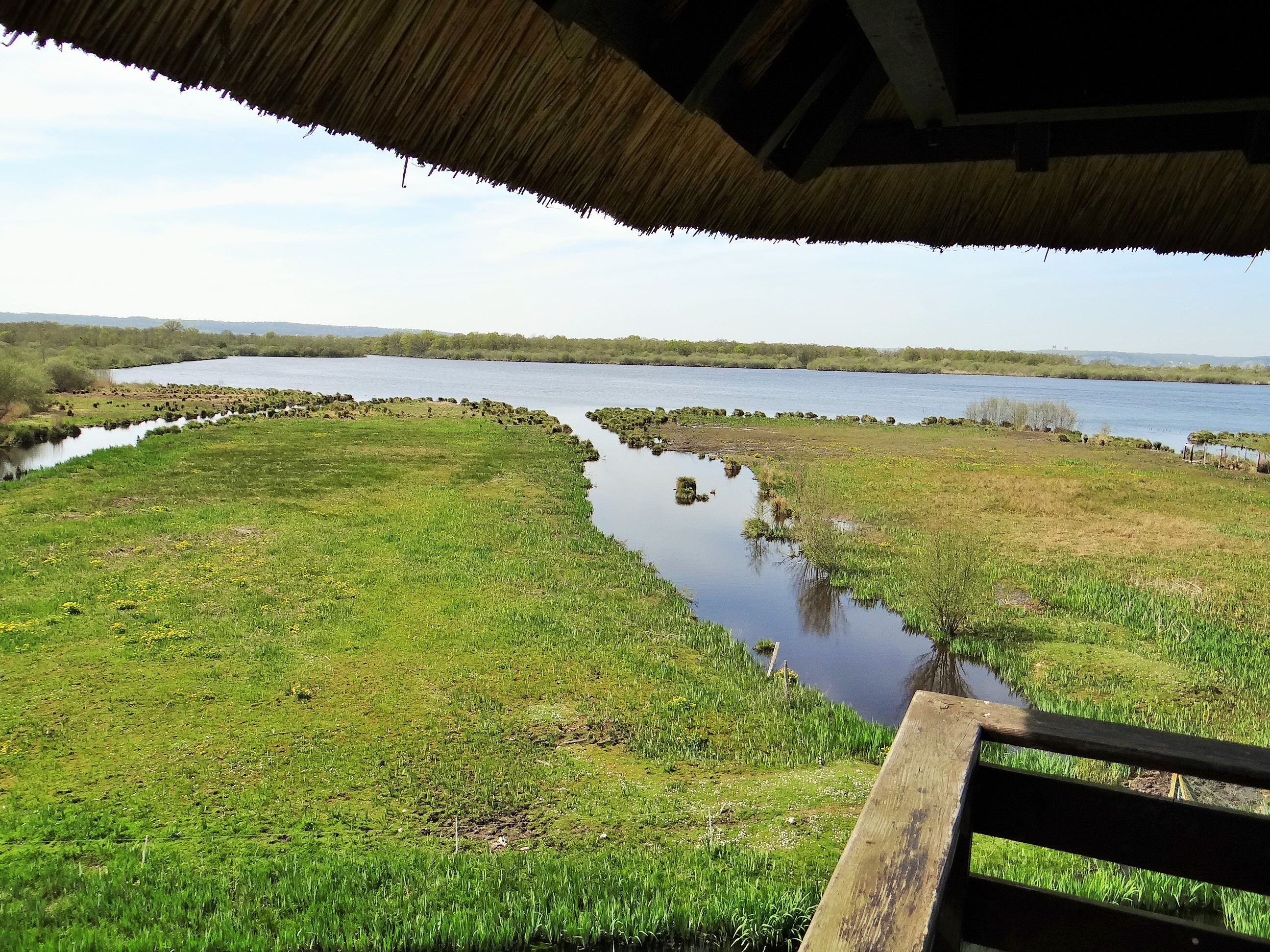 Réserve naturelle nationale du marais Vernier